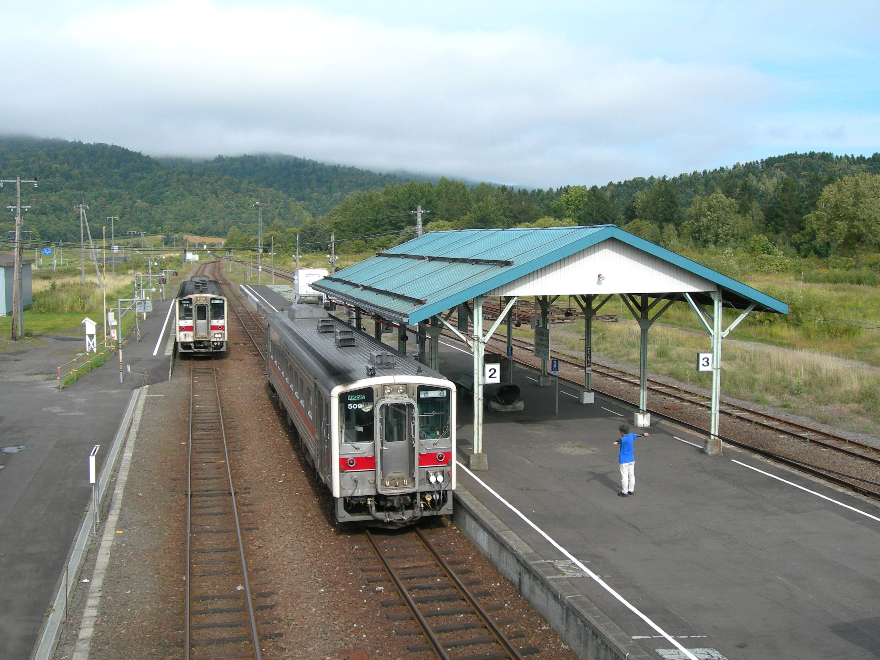 音威子府駅ホーム